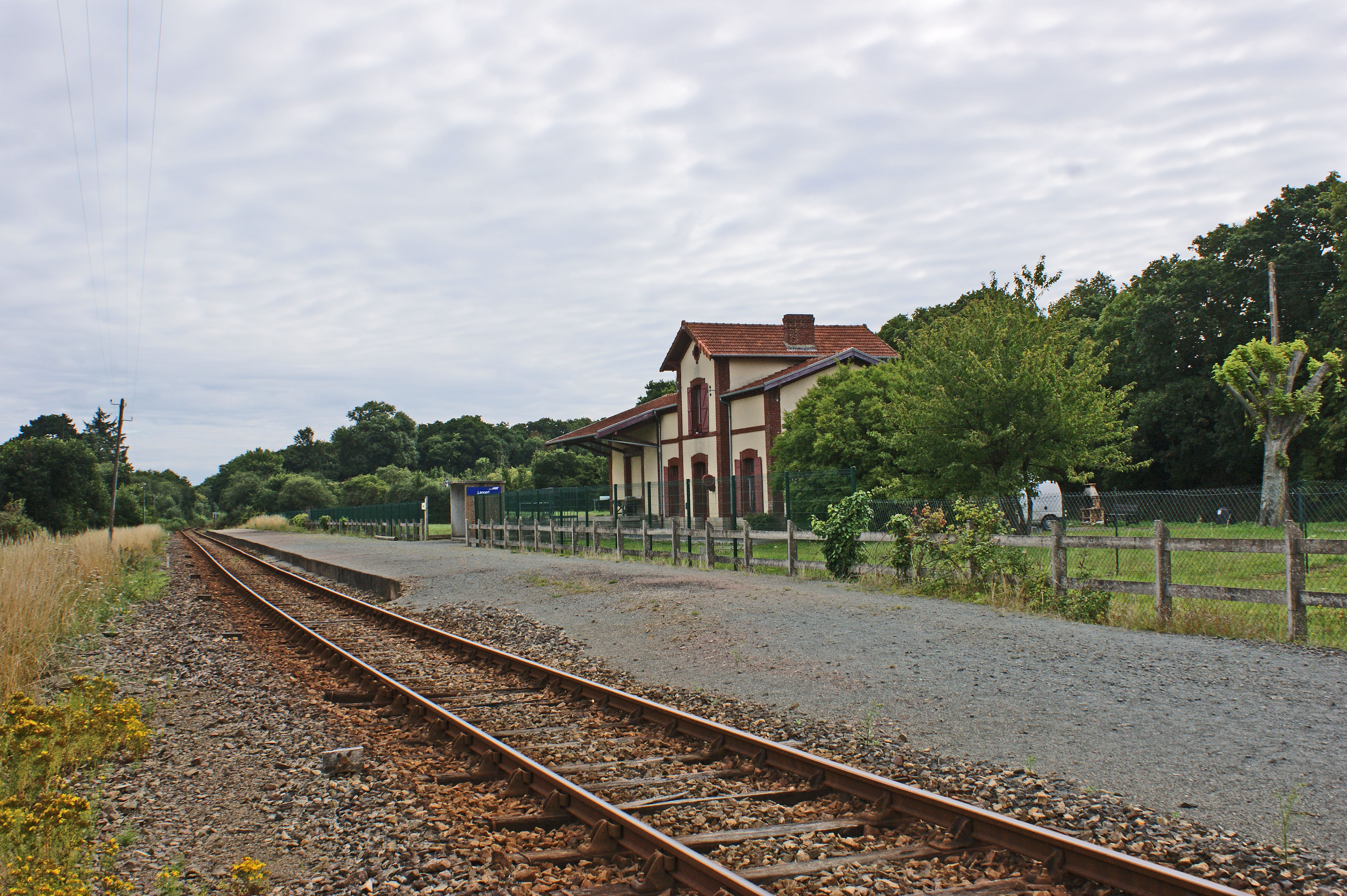 La halte de Lancerf avec sa voie unique et son abri. En arrière plan l'ancien bâtiment de la gare du réseau breton.